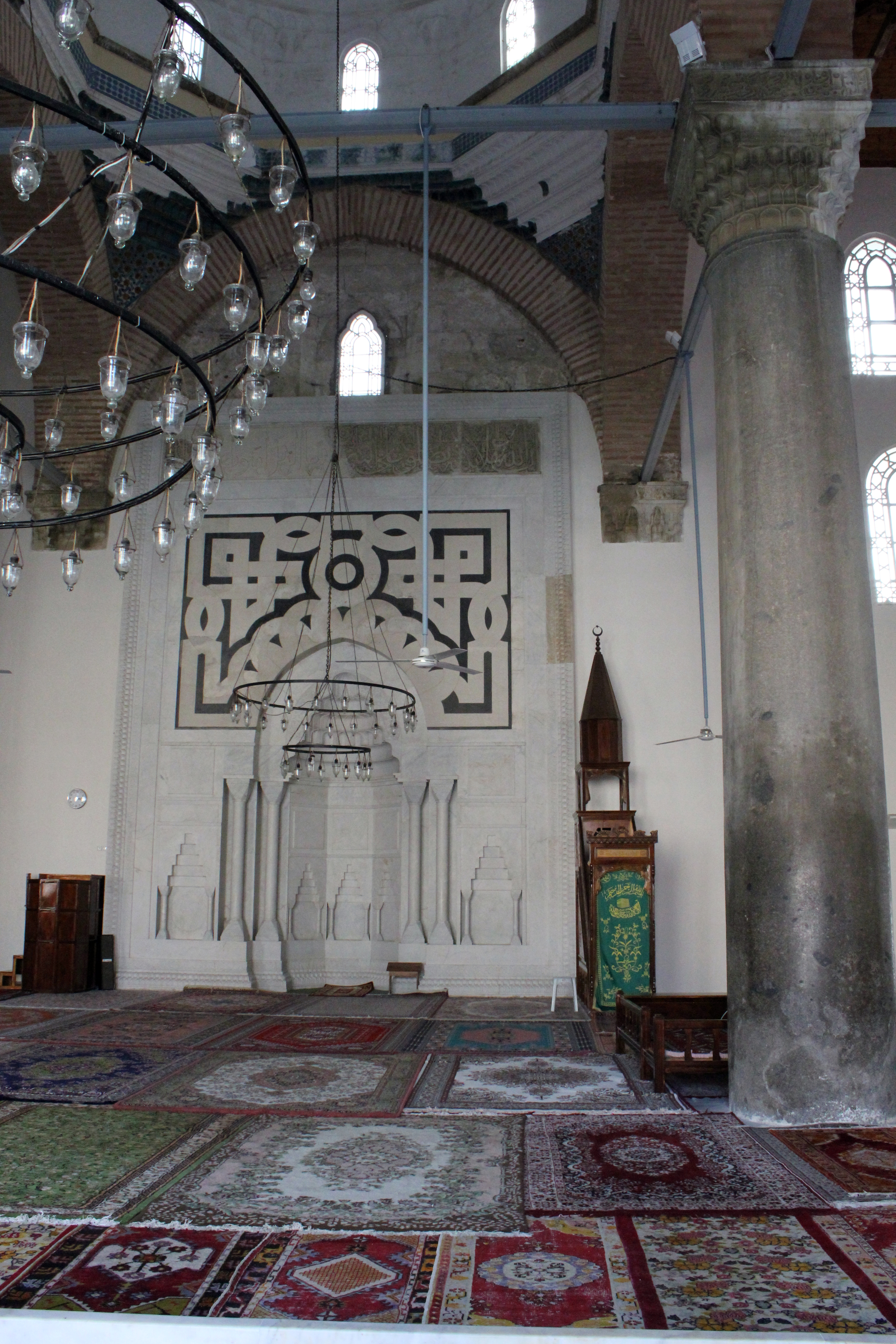 Isabey-Moschee in Selçuk, Westtürkei, Gebetsnische